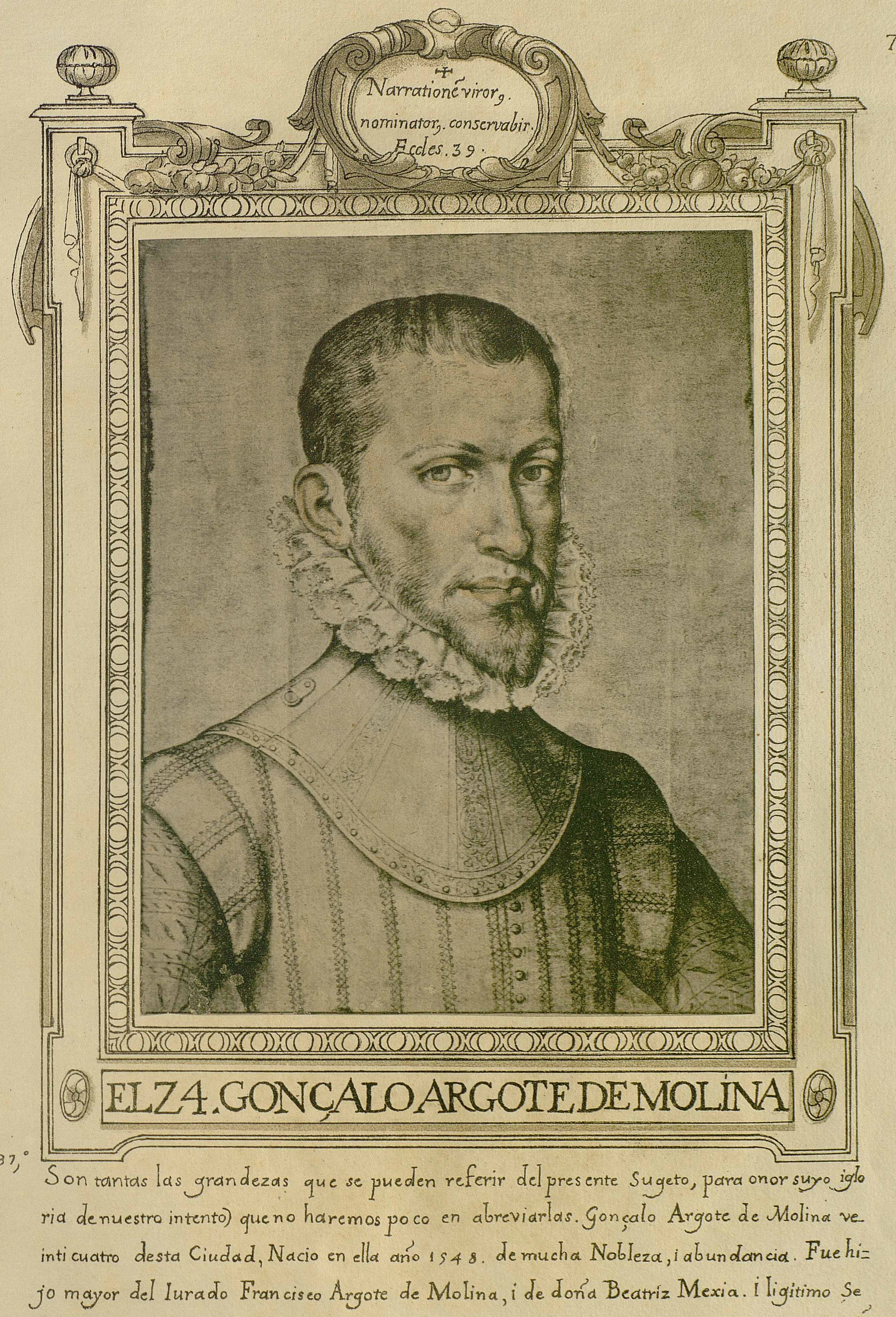 Gonzalo Argote de Molina, Libro de descripción de verdaderos retratos de ilustres y memorables varones, Madrid, Biblioteca de la Fundación Lázaro Galdiano